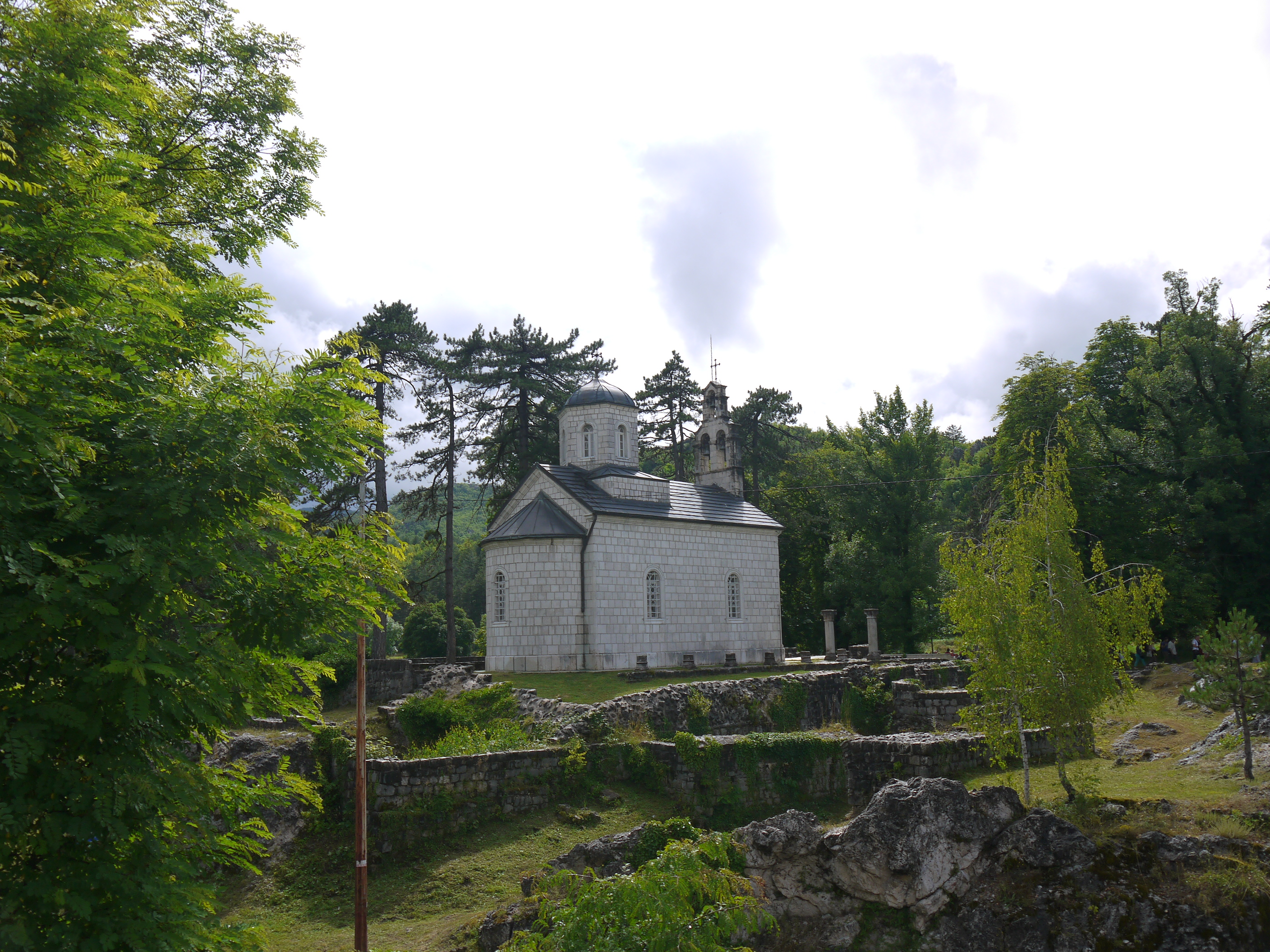 Cetynia - widok na Cerkiew na Cipurze